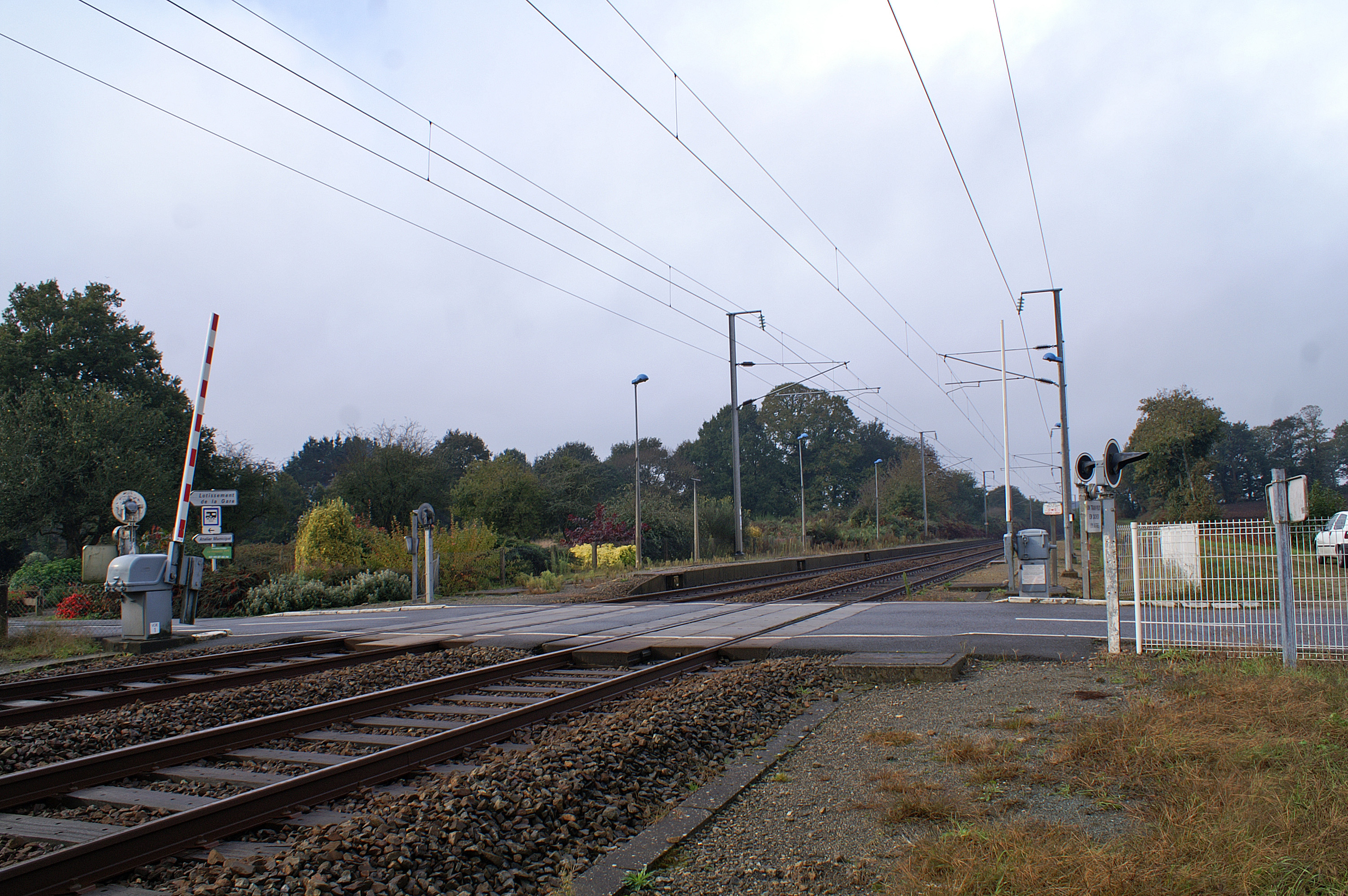 La gare et son passage à niveau en 2009.